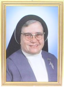 Porträtfoto vom Grab der seligen Mutter Maria Inés Teresa vom allerheiligsten Sakrament im Generalat der Missionsklarissen vom alllerheiligsten Sakrament in Rom